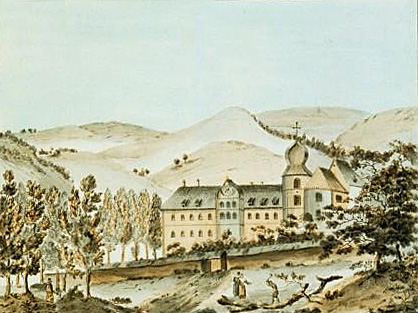 Pairis, l'une des 17 estampes en taille-douce coloriées, 23 x 16,5 cm, de Vues pittoresques de l'Alsace ; Librairie Académique, Strasbourg. Auteur du texte : Philippe-André Grandidier (1752-1787) ; illustrations : François Walter (1755-1830).